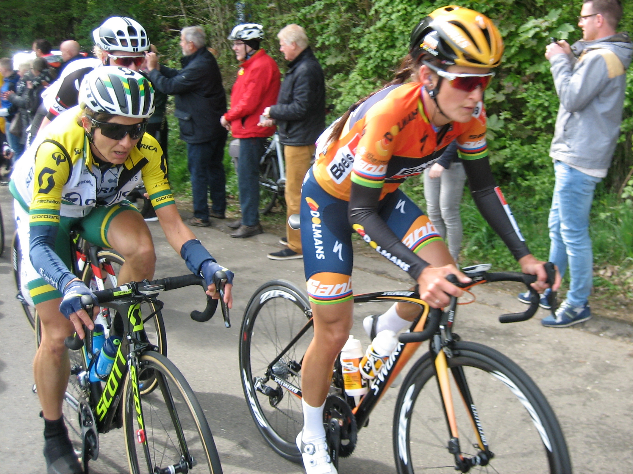 Na 45km, beklimming van de Eyserbosweg, in de Amstel Gold Race Ladies Edition 2017.